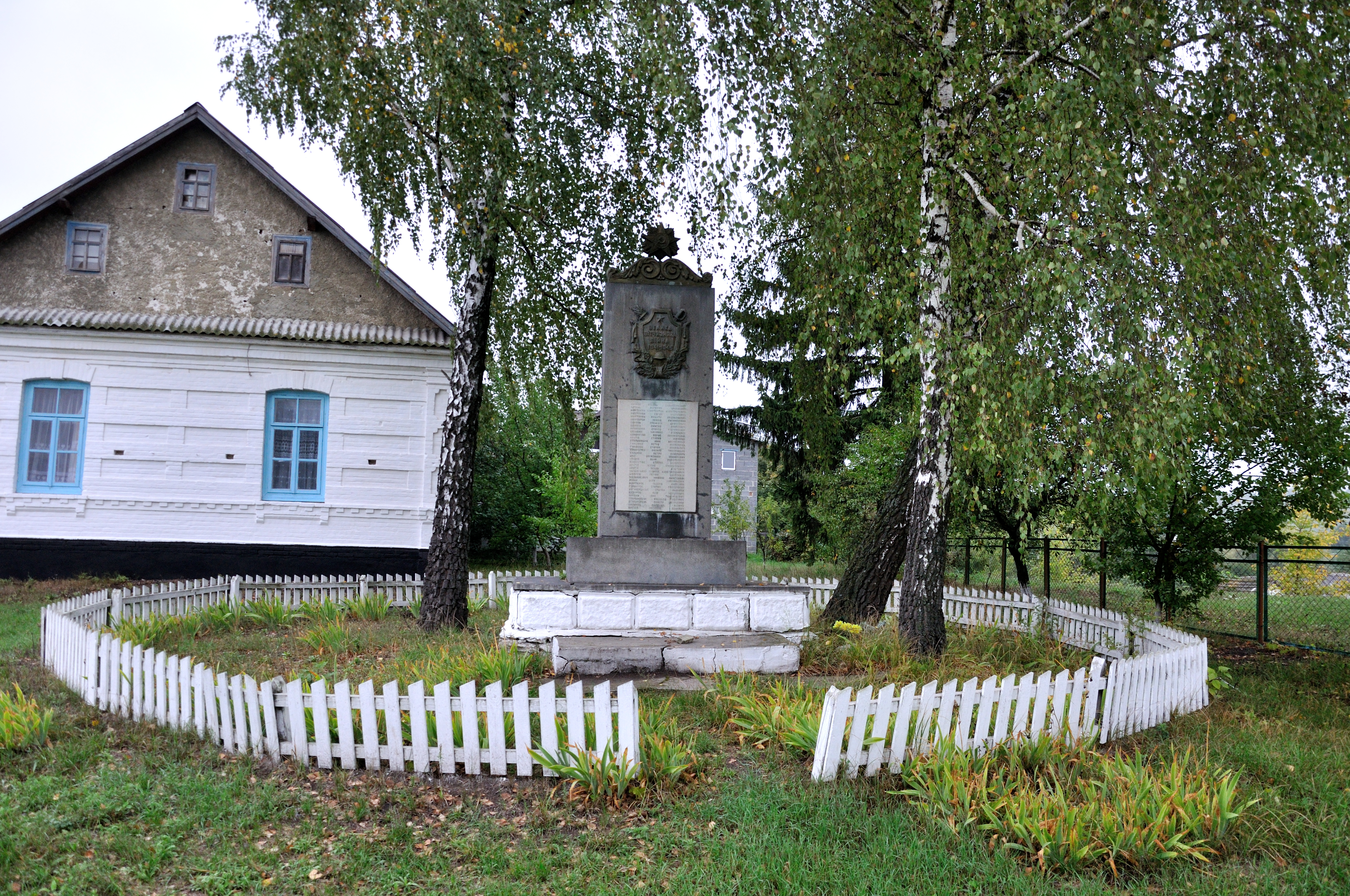 Пам’ятник воїнам- односельчанам і жертвам УБН, с. Країв